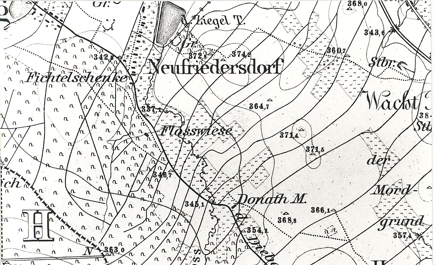 Original image description from the Deutsche Fotothek Friedersdorf. Meßtischblatt, Sekt. Neusalza, 1883